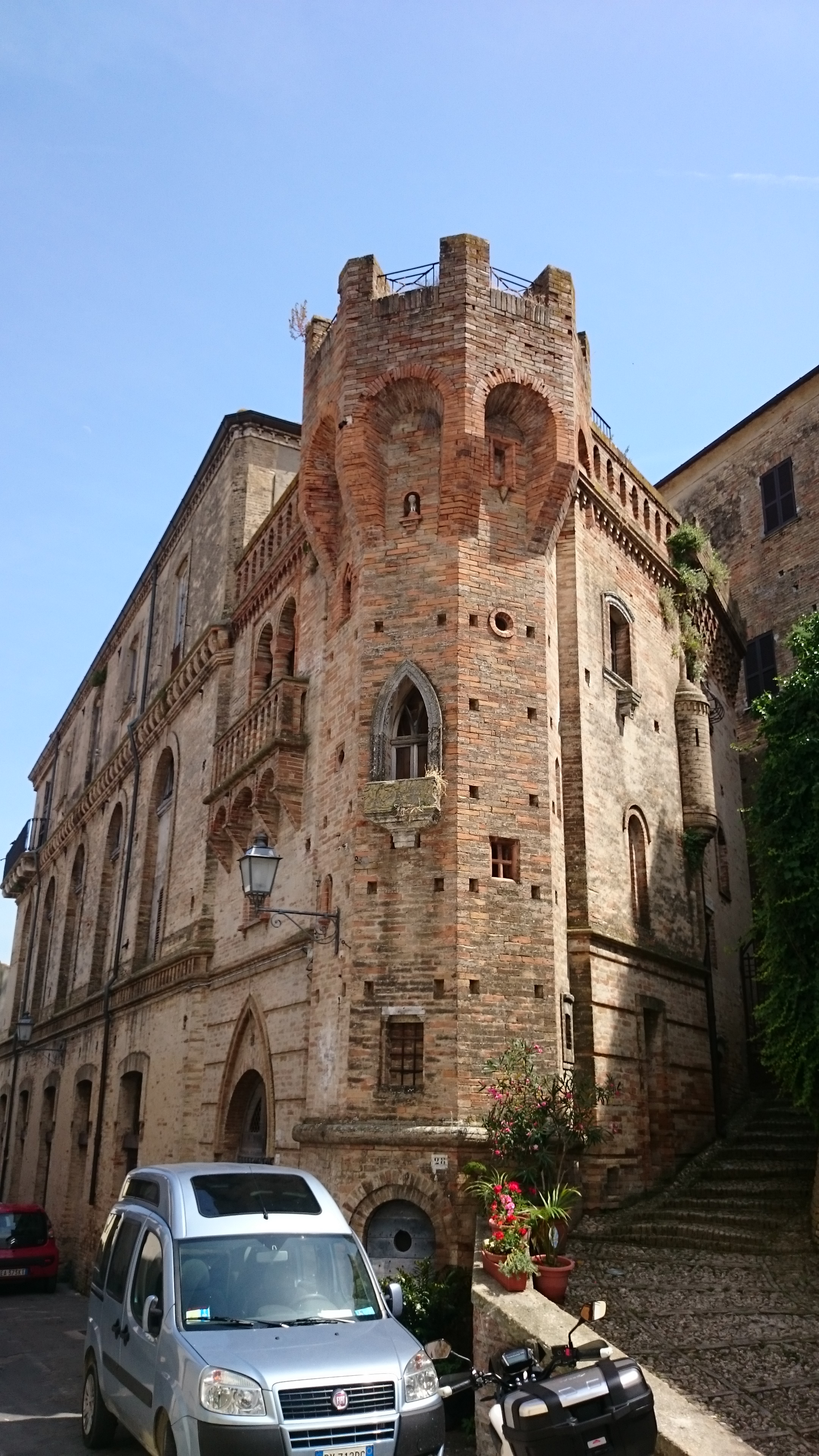 Loreto Aprutino